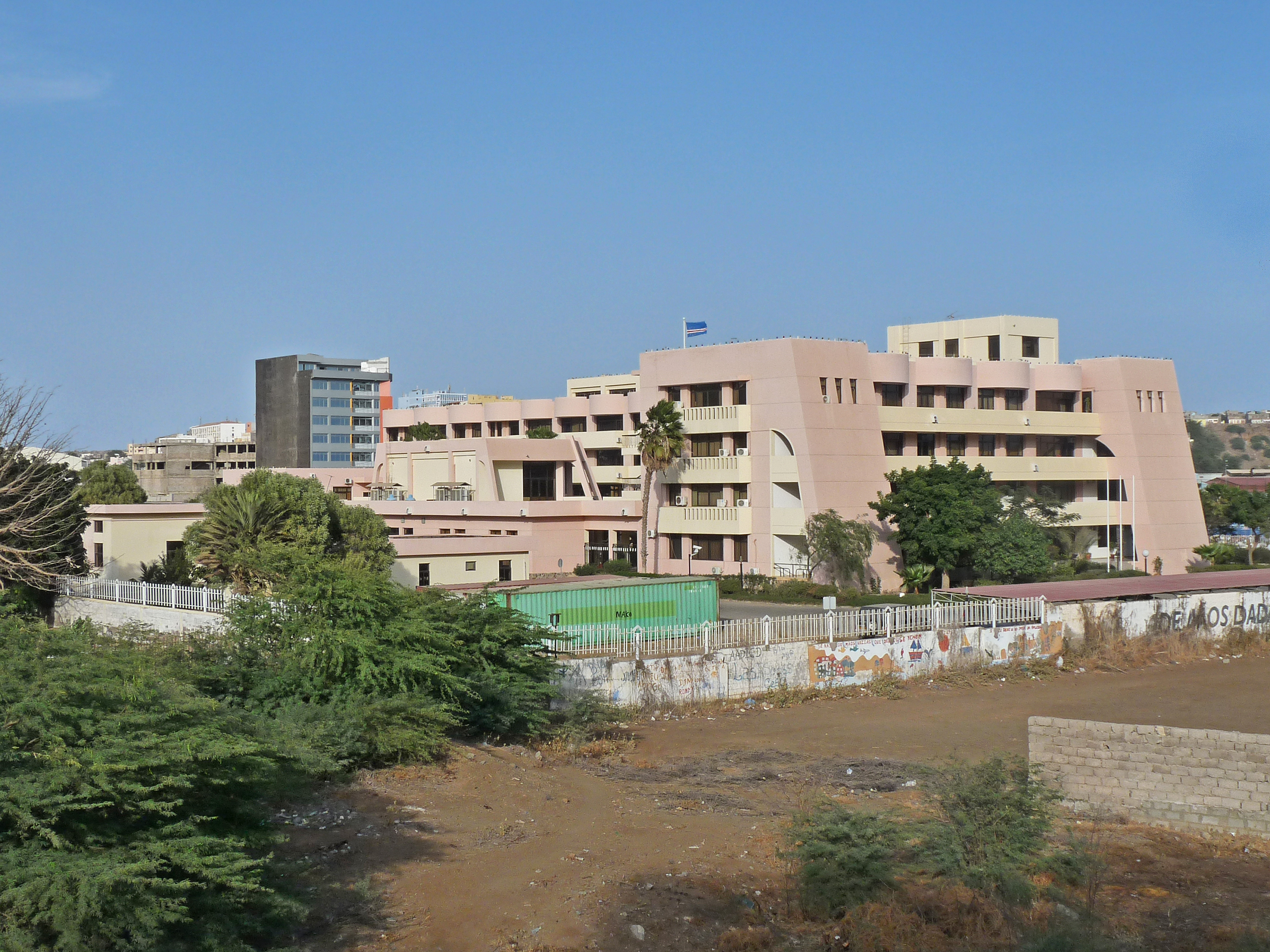 Praia : Assemblée nationale du Cap-Vert